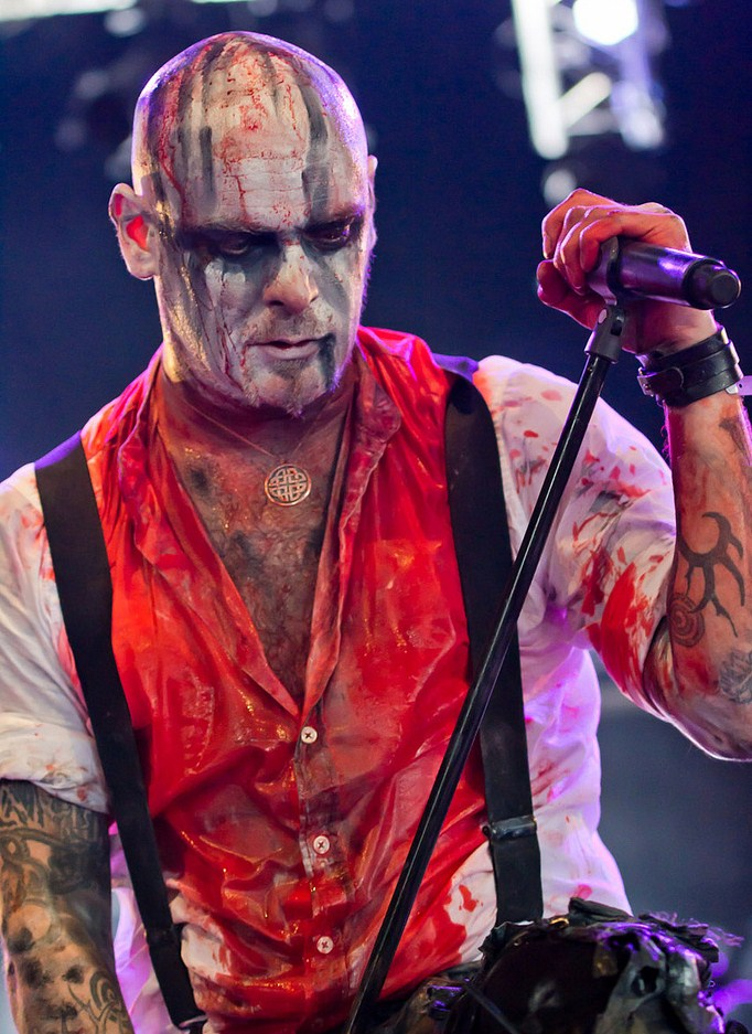 Alan "Nemtheanga" Averill, vocalita de Primordial, actuando en el Hellfest Open Air de 2011.